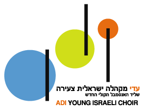 Logo Adi Choir